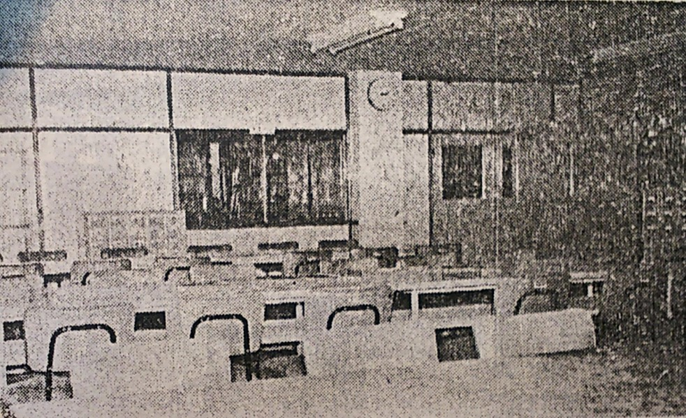 1962年12月に尾西文化会館の3階に移転した尾西市立図書館。愛知県尾西市（現・一宮市）。